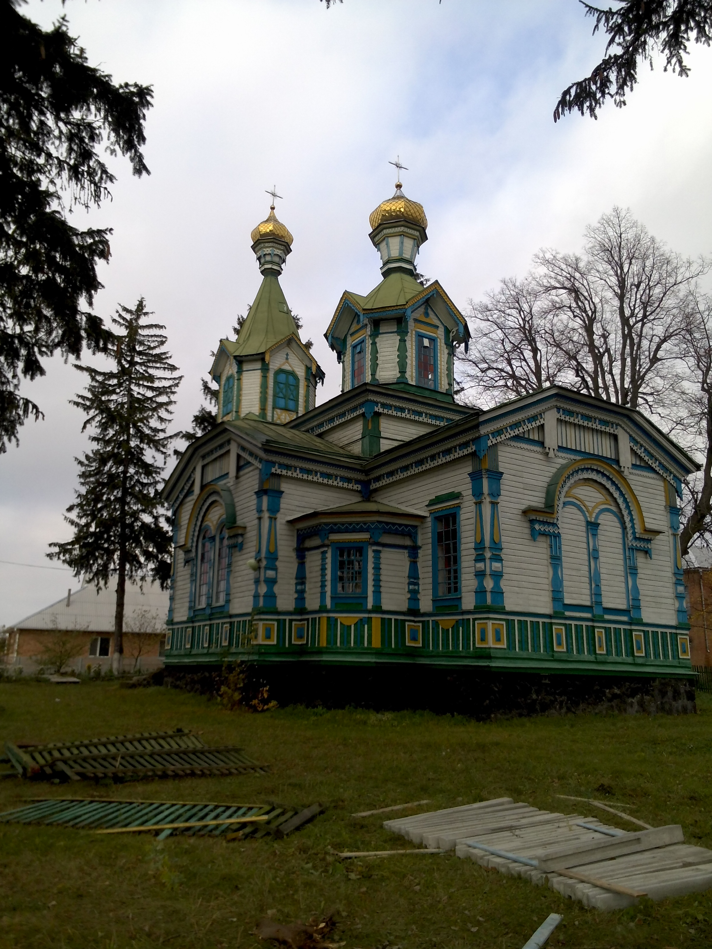 с. Косаківка. Церква Іоанна Богослова